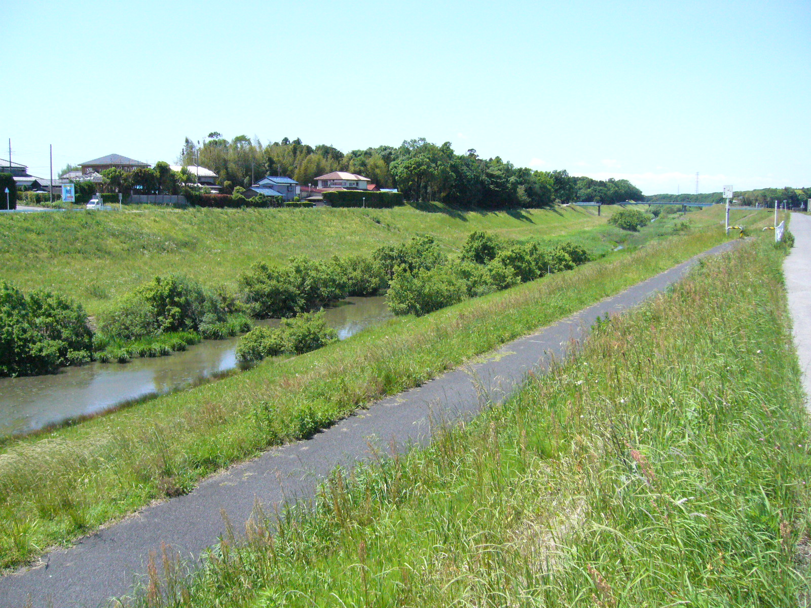 tone-canal,noda-city,japan